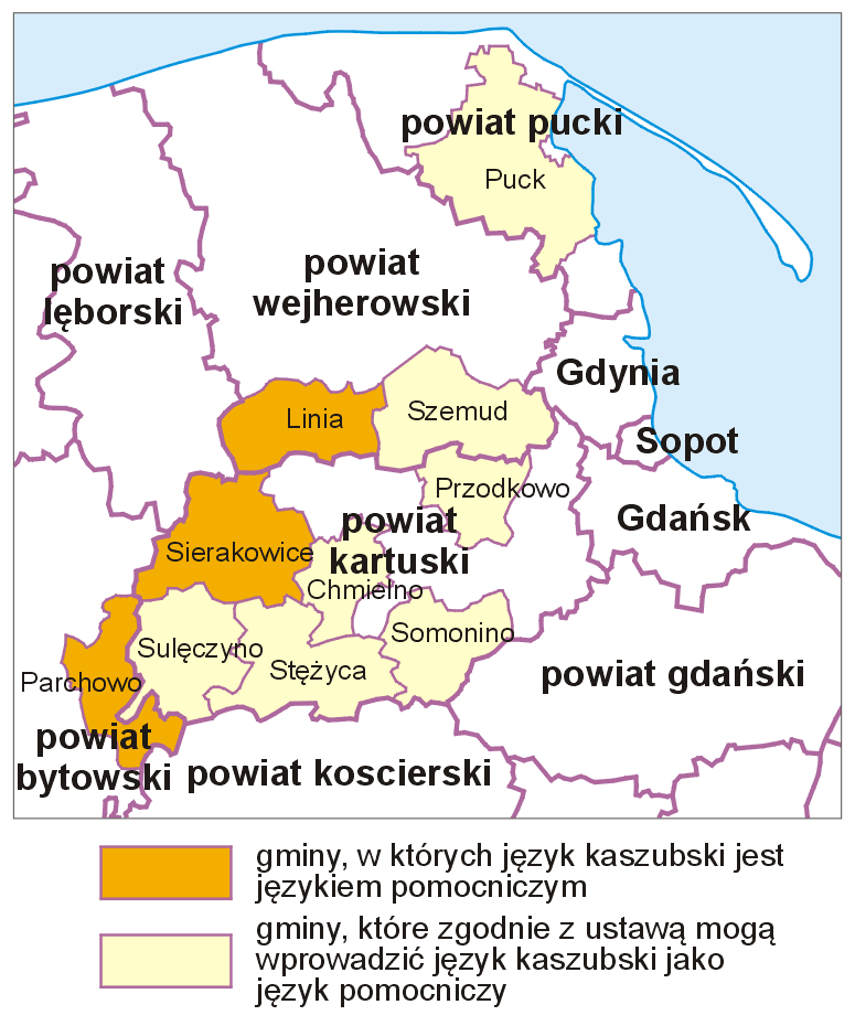 Official/auxiliary Kashubian language in communes in Pomeranian VoivodeshipGminy, w których język kaszubski został uznany językiem pomocniczym oraz gminy, które, zgodnie z danymi ze spisu powszechnego z 2001 roku, spełniały ustawowe wymagania do wprowadzenia jako pomocniczego języka kaszubskiego, lecz tego nie uczyniły (stan na 23.04.2012).